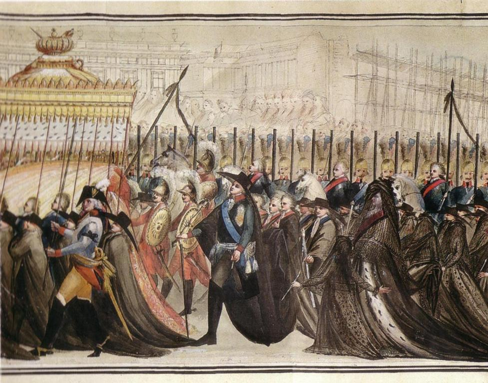 Вторичные похороны Петра III, 2 декабря 1796 г. Составить представление о том, как выглядела траурная процессия мы можем по ее изображению, сделанному неизвестным (по всей вероятности, итальянским) художником. Изображение это представляет собой рулон длиной 15,8 м и шириной 0,75 м. Центр траурной процессии - колесница с саркофагом под балдахином. Рядом с ней идет император с маршальским жезлом и тростью, следом императрица Мария Федоровна с дочерьми и свитой